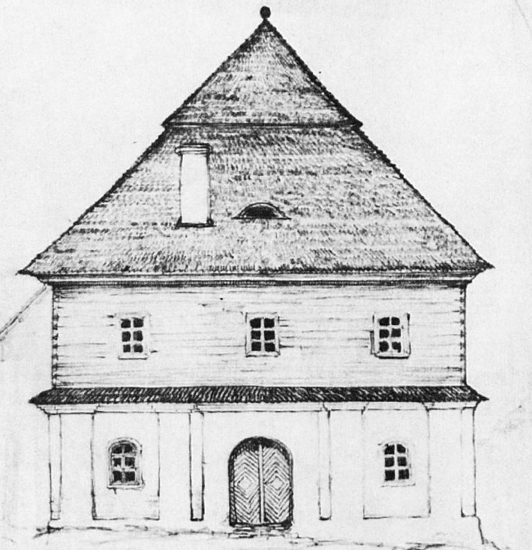 Беларуская (тарашкевіца): Глыбокае (Hłybokaje), вуліца Докшыцкая (vulica Dokšyckaja). Сынагога